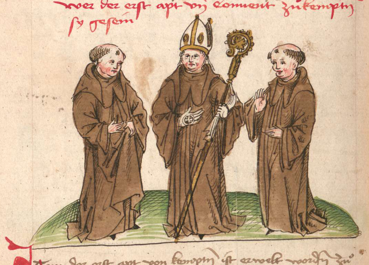 Der erste Abt von Kempten namens Audogar mit zwei Mönchen - Darstellung in der Karlschronik (Kemptener Klosterchronik)